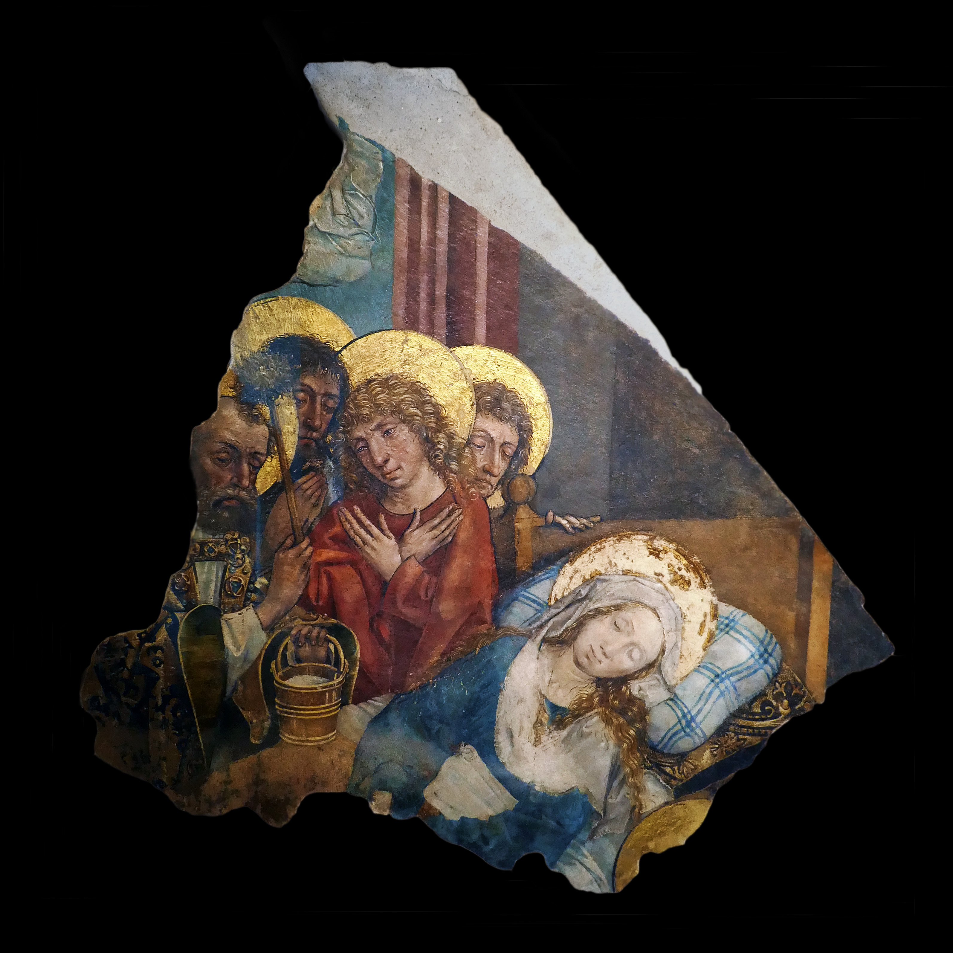 Dormition de la Vierge. Fragment de peinture murale provenant de l'église Sainte-Madeleine de Strasbourg, vers 1480. Cette peinture murale se trouvait dans l'un des enfeus de l'église gothique de 1478 qui a brûlé en 1904 (l'incendie de l'orphelinat attenant ayant mis le feu à l'église). La nef et le chœur comportaient chacun plusieurs enfeus. Selon la restauratrice, d'après les contours du fragment, la localisation la plus probable serait celle de l'enfeu Nord-Ouest du chœur. Ce fragment, sauvé après l'incendie de 1904, a été acquis par la Société pour la Conservation des Monuments historiques d'Alsace en 1913, puis déposé aux musées. Il a été cédé à la Ville de Strasbourg en 1946, en même temps que l'ensemble des collections. Technique picturale mixte sur enduit de chaux et de sable, dorure à la feuille. Déjà restaurée en 1975, la pièce l'a été de manière plus approfondie en 2017, par Camille Jouen, dans le cadre d'un Diplôme national de restaurateur du patrimoine (Institut national du patrimoine). Exposé au Musée de l'Œuvre Notre-Dame de Strasbourg. Inv. MAD.XIII.20